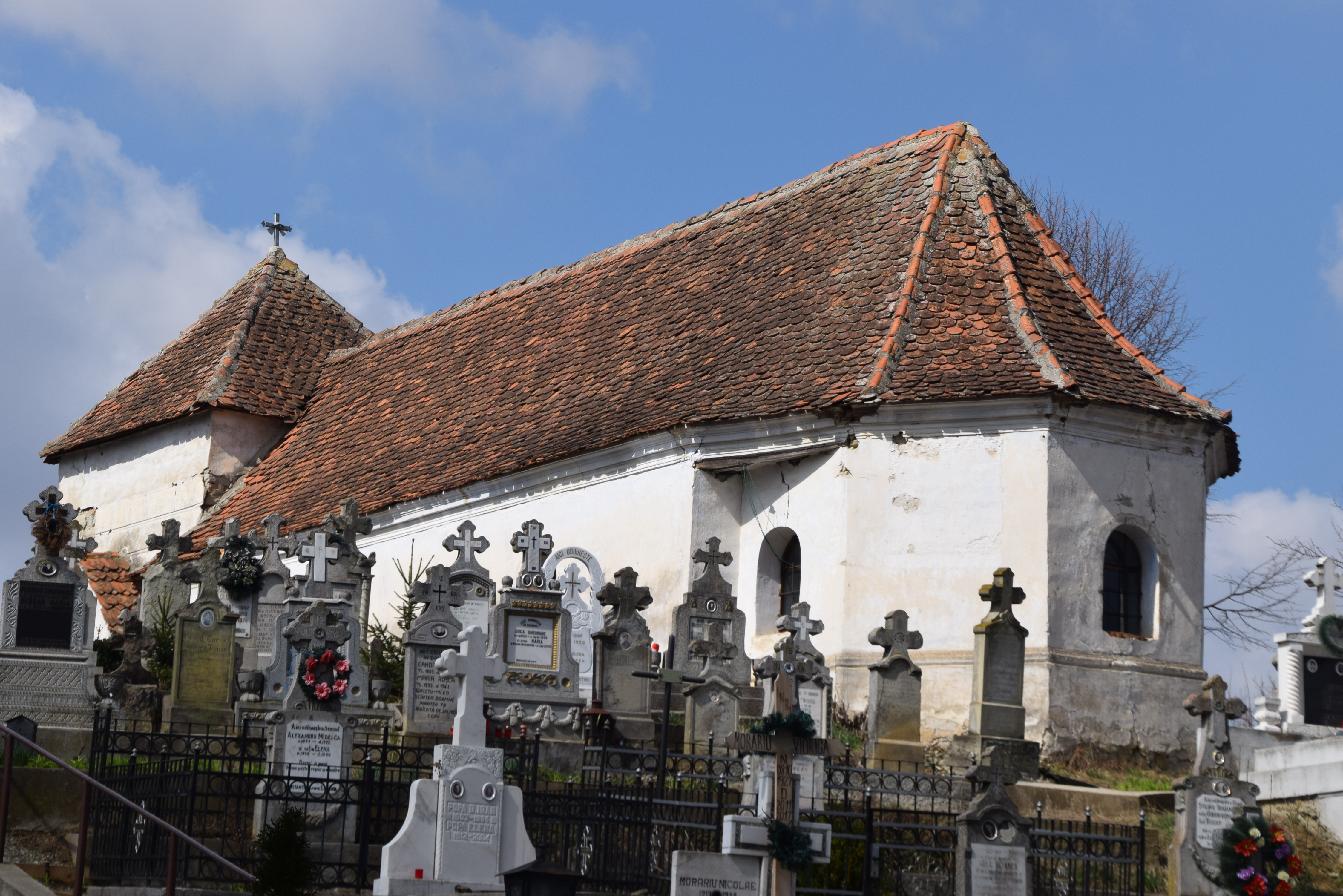 Biserica „Adormirea Maicii Domnului”, din cimitir